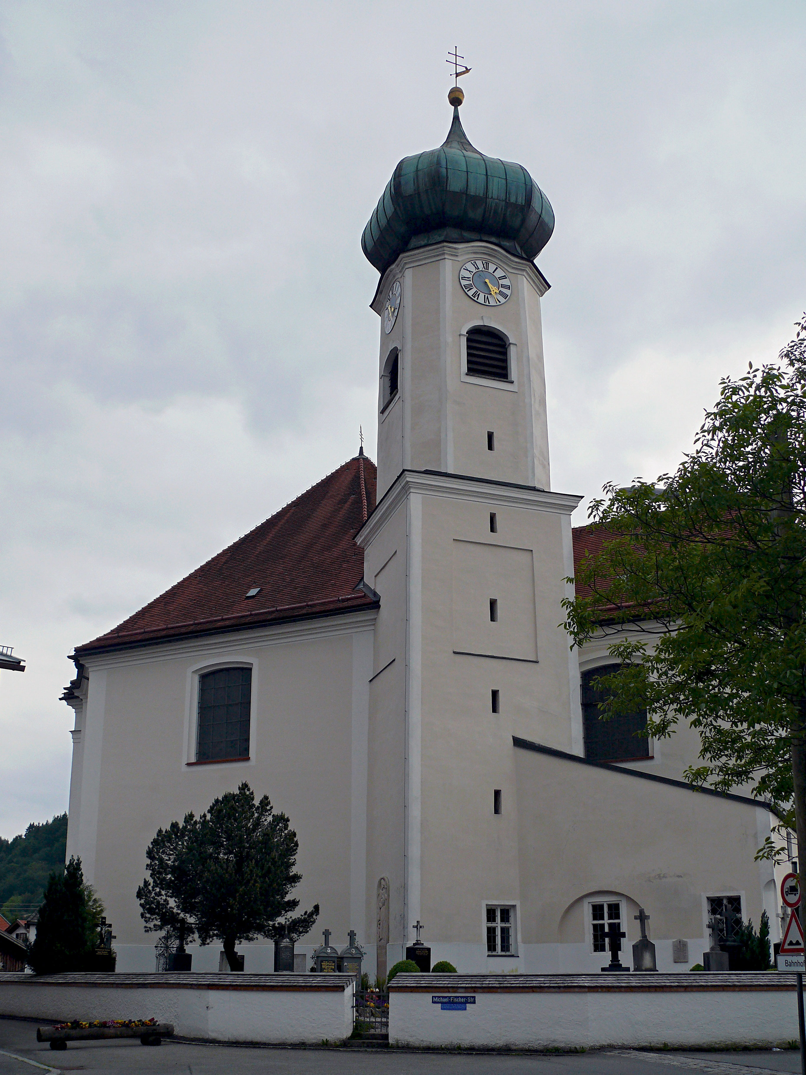 . Baudenkmal in Eschenlohe, Pfarrkirche St. Clemens, Katholische Pfarrkirche, barocker oktogonaler Zentralraum mit rechteckigem Chor und östlichem Zwiebelturm, von Franz Anton Kirchgrabner nach Plänen von Johann Michael Fischer, 1764-82; mit Ausstattung.